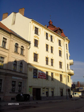 Porges Palota, Banská Bystrica